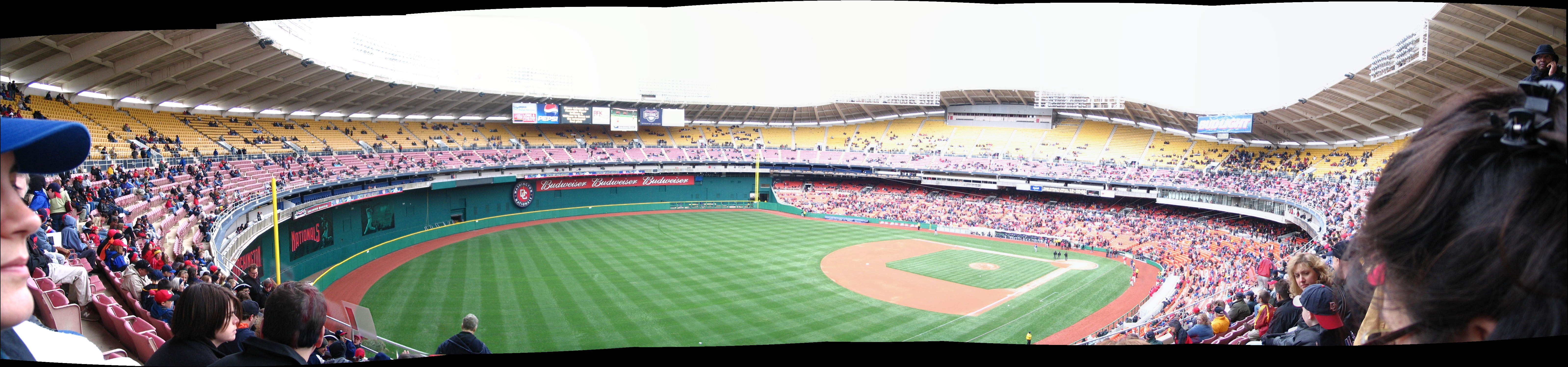 Panorama du Robert F. Kennedy Memorial Stadium. Prise à Washington, District of Columbia Appareil photo utilisé : Canon PowerShot A75 Prise le 3 avril 2005 auteur : randomduck